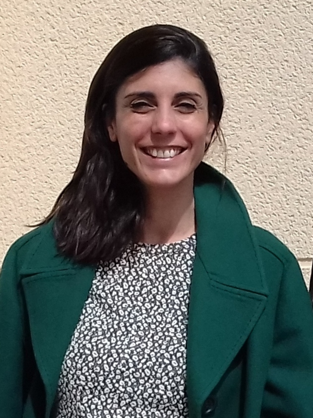 Raquel Ejerique en Teo en 2018